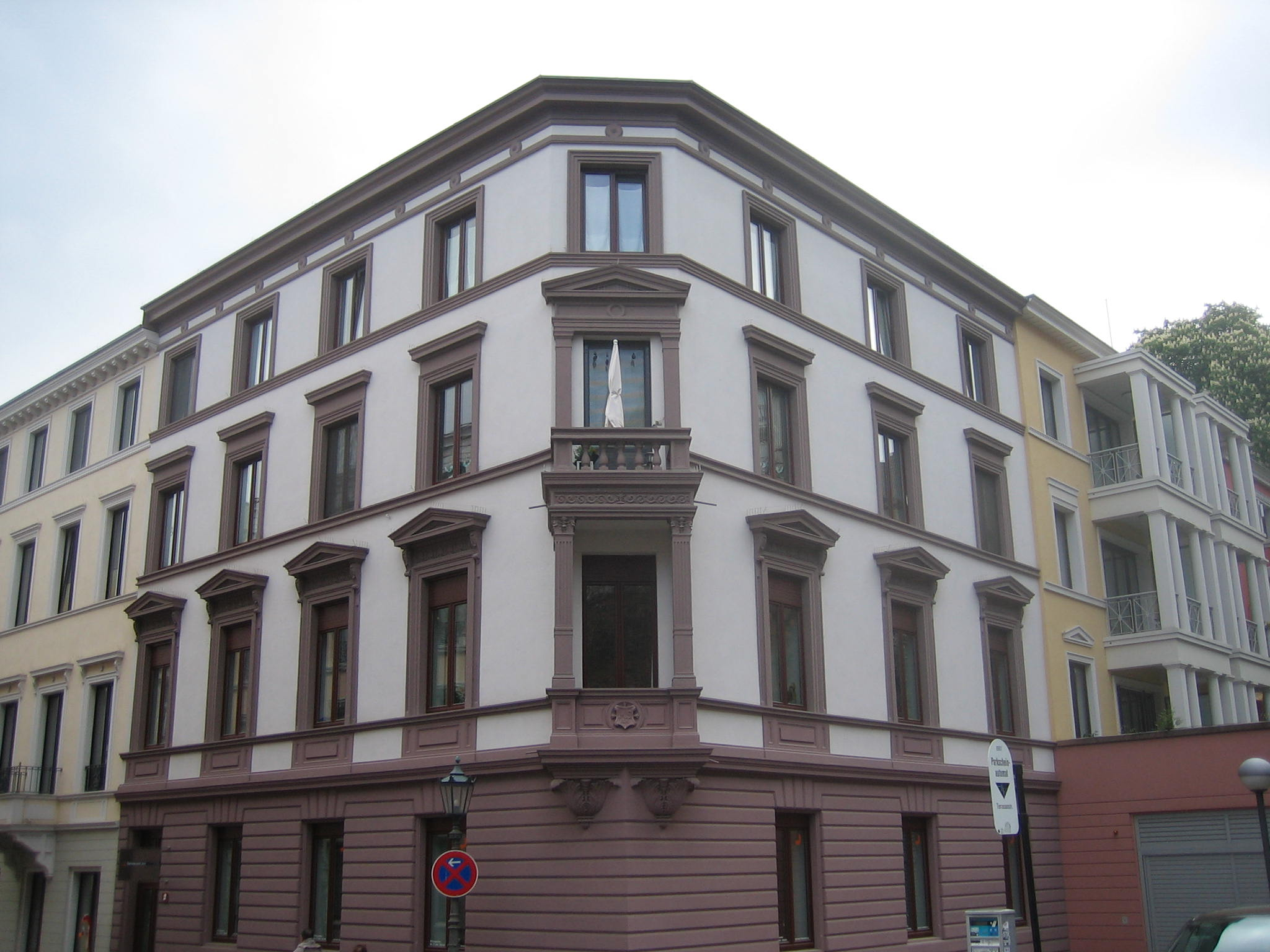 Wohnbebauung auf dem Kästrich - Mitte des 19. Jahrhunderts